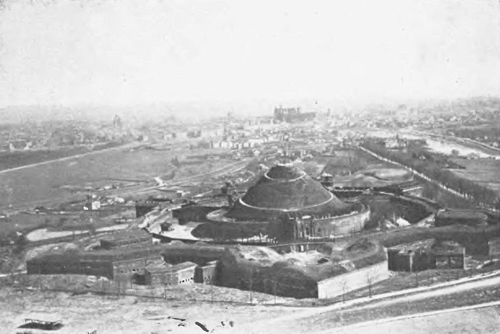 Kopiec Kościuszki w Krakowie przed 1929